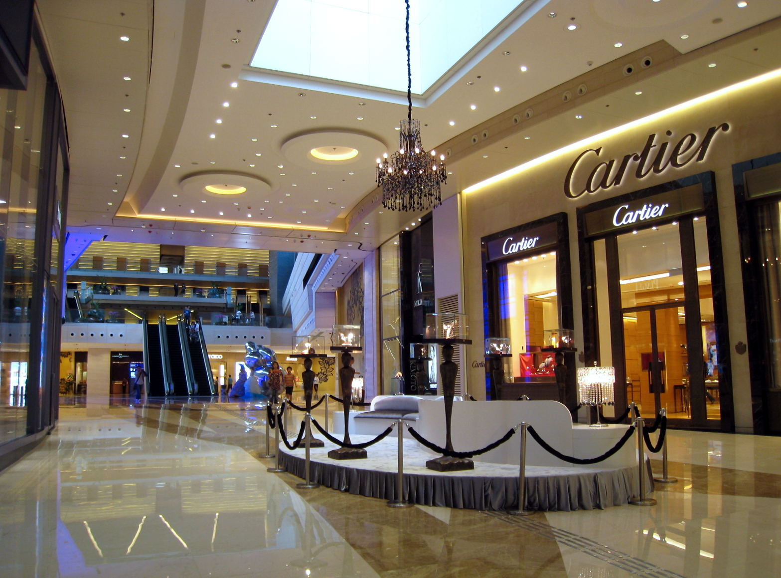 HK Elements Phase 2 Metal Zone